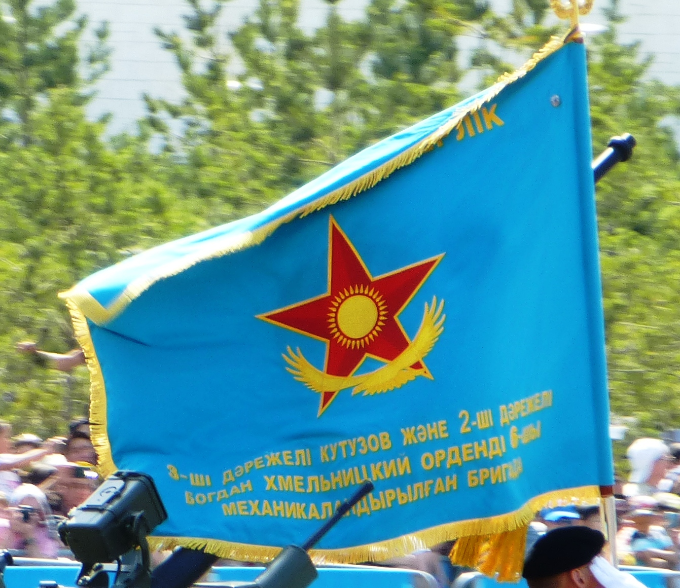 Текст на знамени в переводе на русский - Орденов Кутузова 3-й степени и Богдана Хмельницкого 2-й степени 6-я механизированная бригада. Все награды 6-я мехбр унаследовала от 66-го мотострелкового полка 80-й гвардейской учебной мотострелковой дивизии